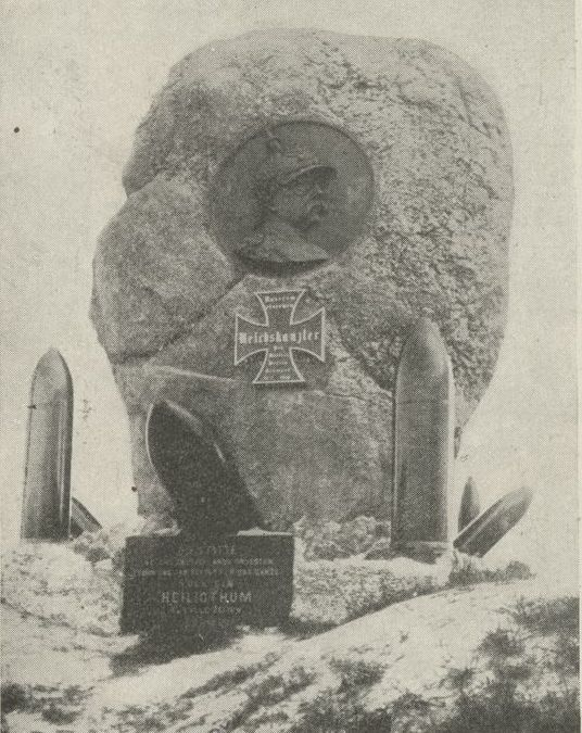 Bismarck-Denkmal in Bismark (Altmark), 1910 (unter Verwendung eines Hünengrabs. Das Denkmal wurde teilzerstört, der Stein soll sich ohne das Bismarcksche Beiwerk erhalten haben)